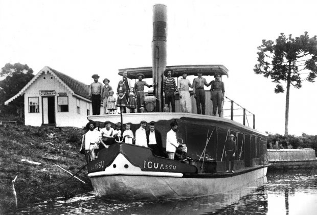 Vapor Iguassu em Porto Amazonas.